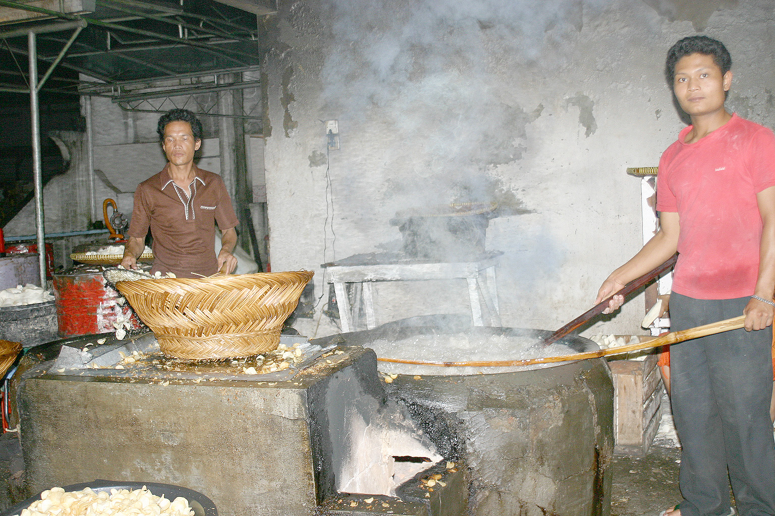 Making Keripik Sanjay (tapioca crackers) in West Sumatra, Indonesia